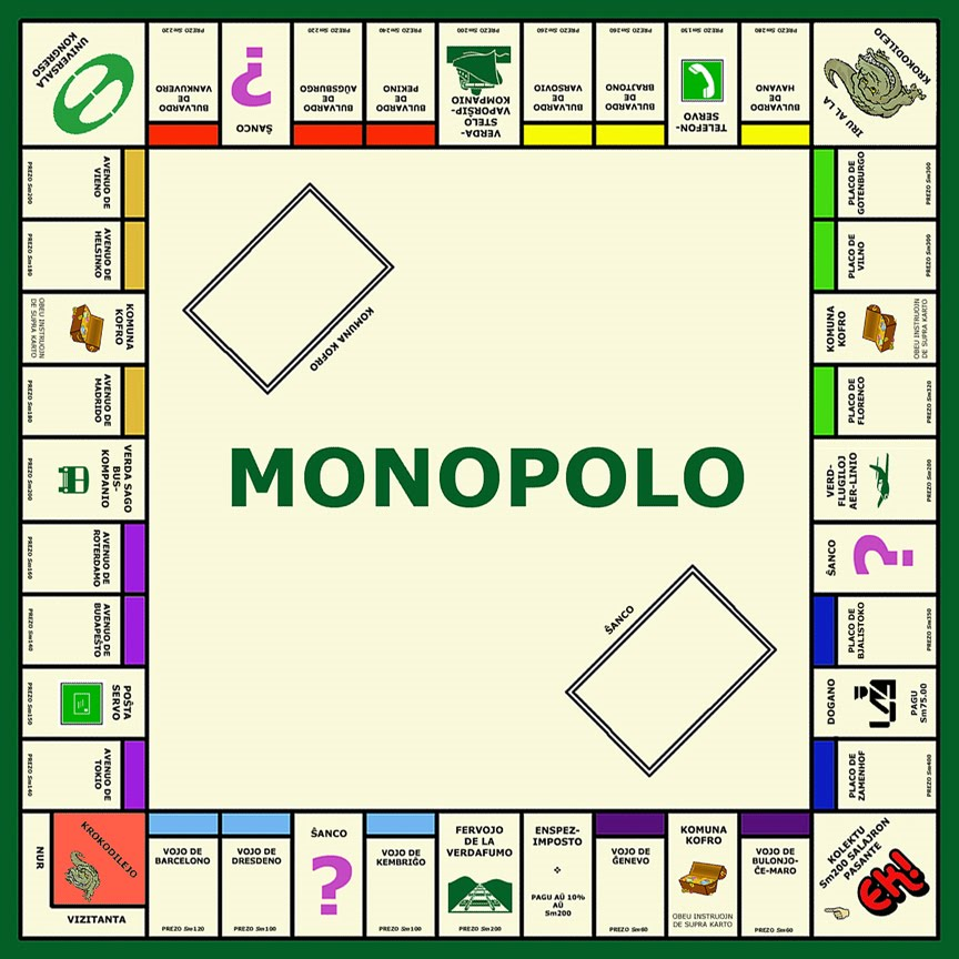 Esperanta tabulo de la ludo Monopolo